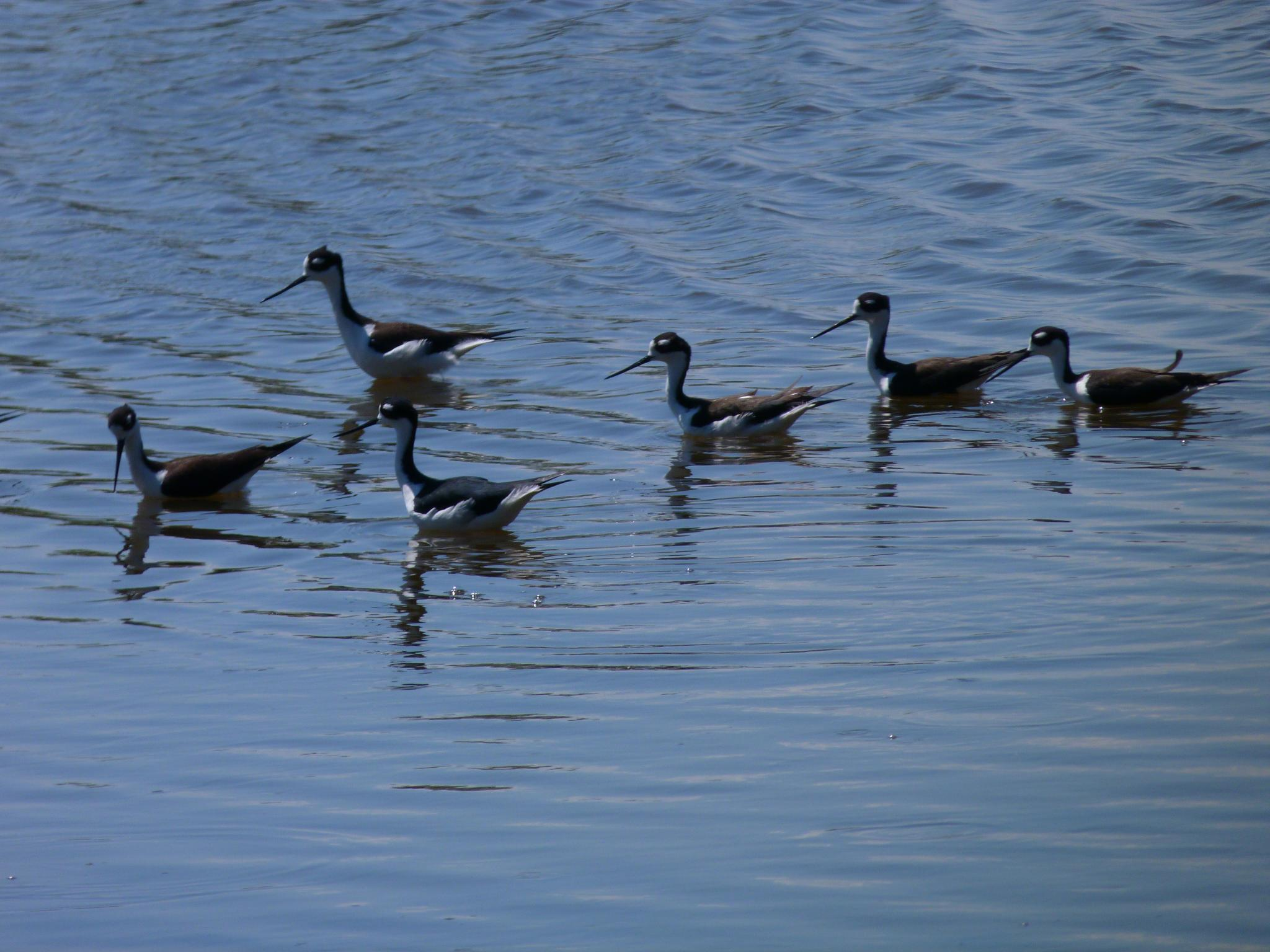 stilts